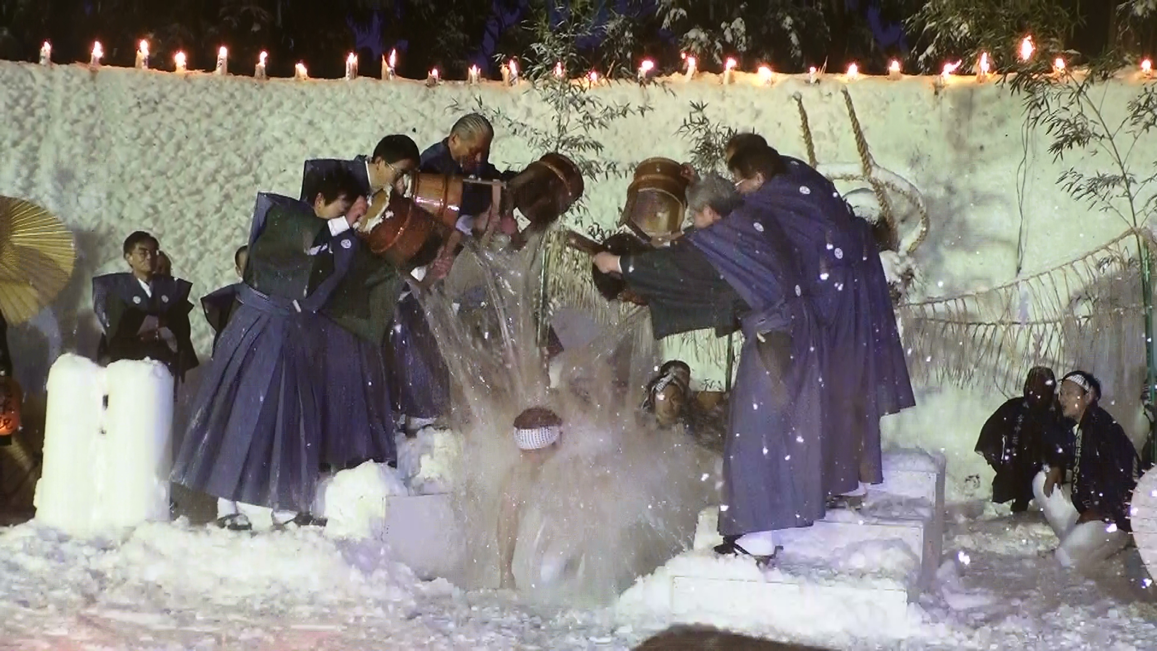 雪中花水祝（新潟県魚沼市）